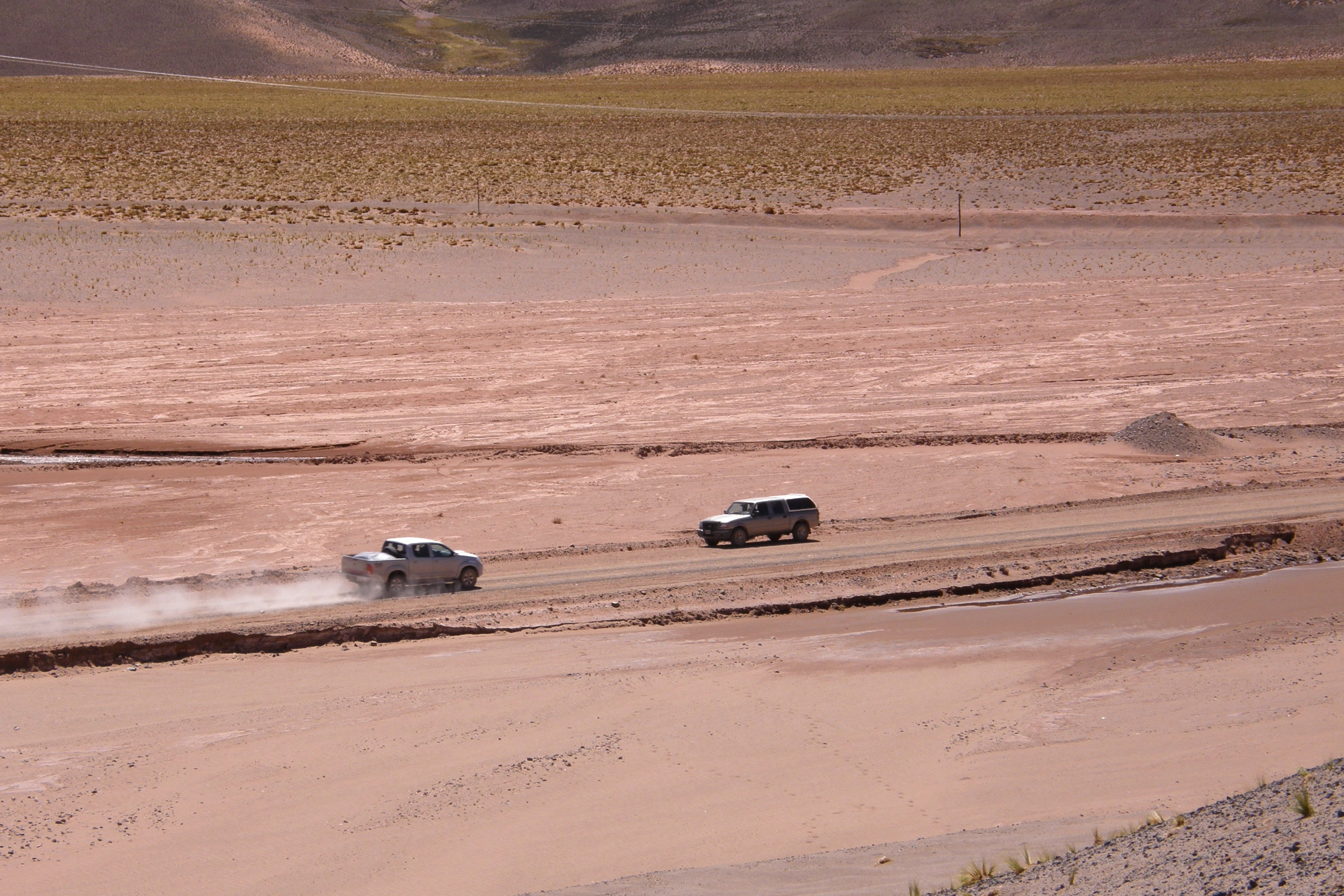 Ruta Nacional 51 près de Olacapato Grande. A Cet endroit la RN 51 passe sur la province de Jujuy, toutefois la limite avec celle de Salta se situe à quelques mètres